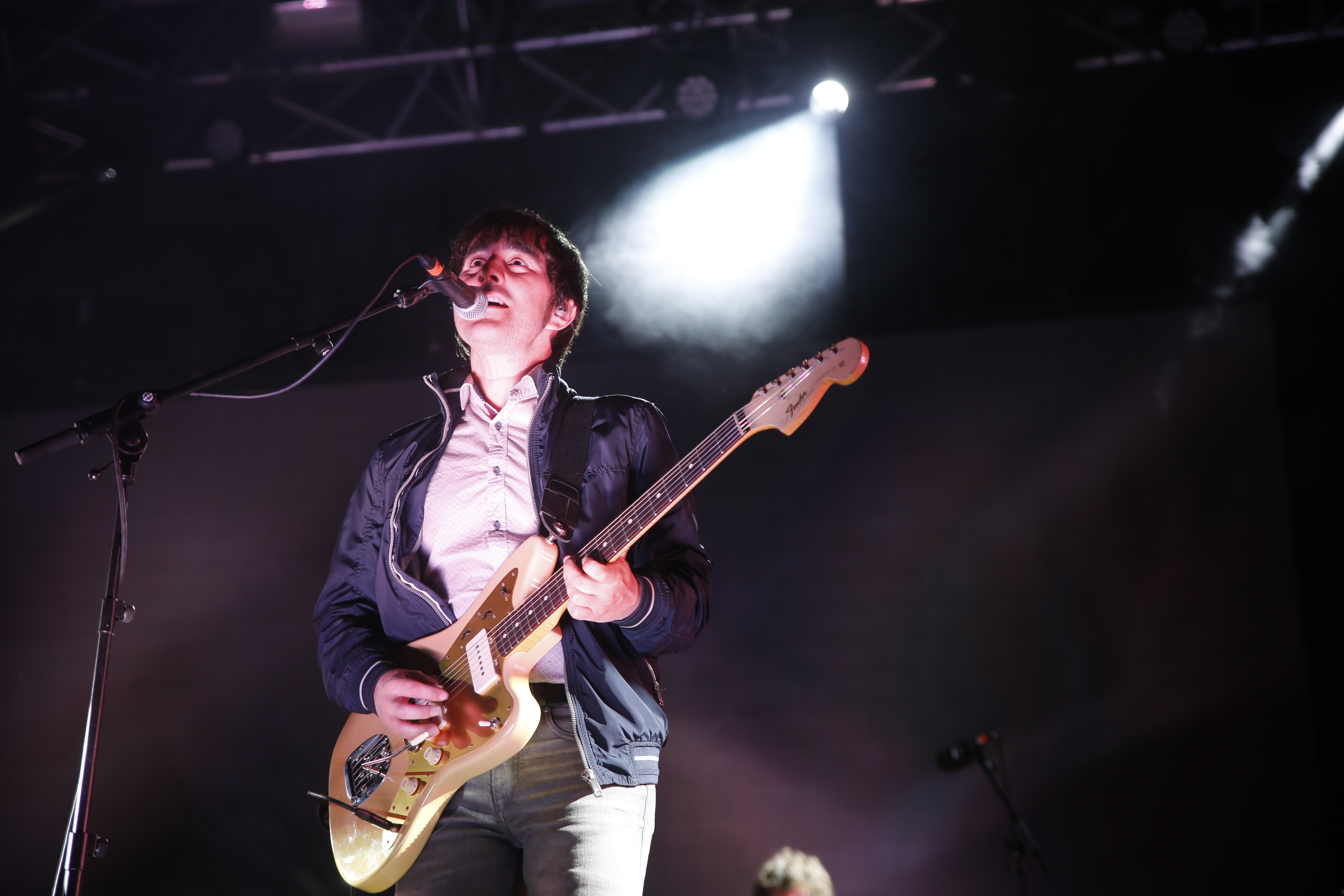 El grupo Lori Meyers en el festival Palencia Sonora 2018. Alejandro Méndez, voz y guitarra.